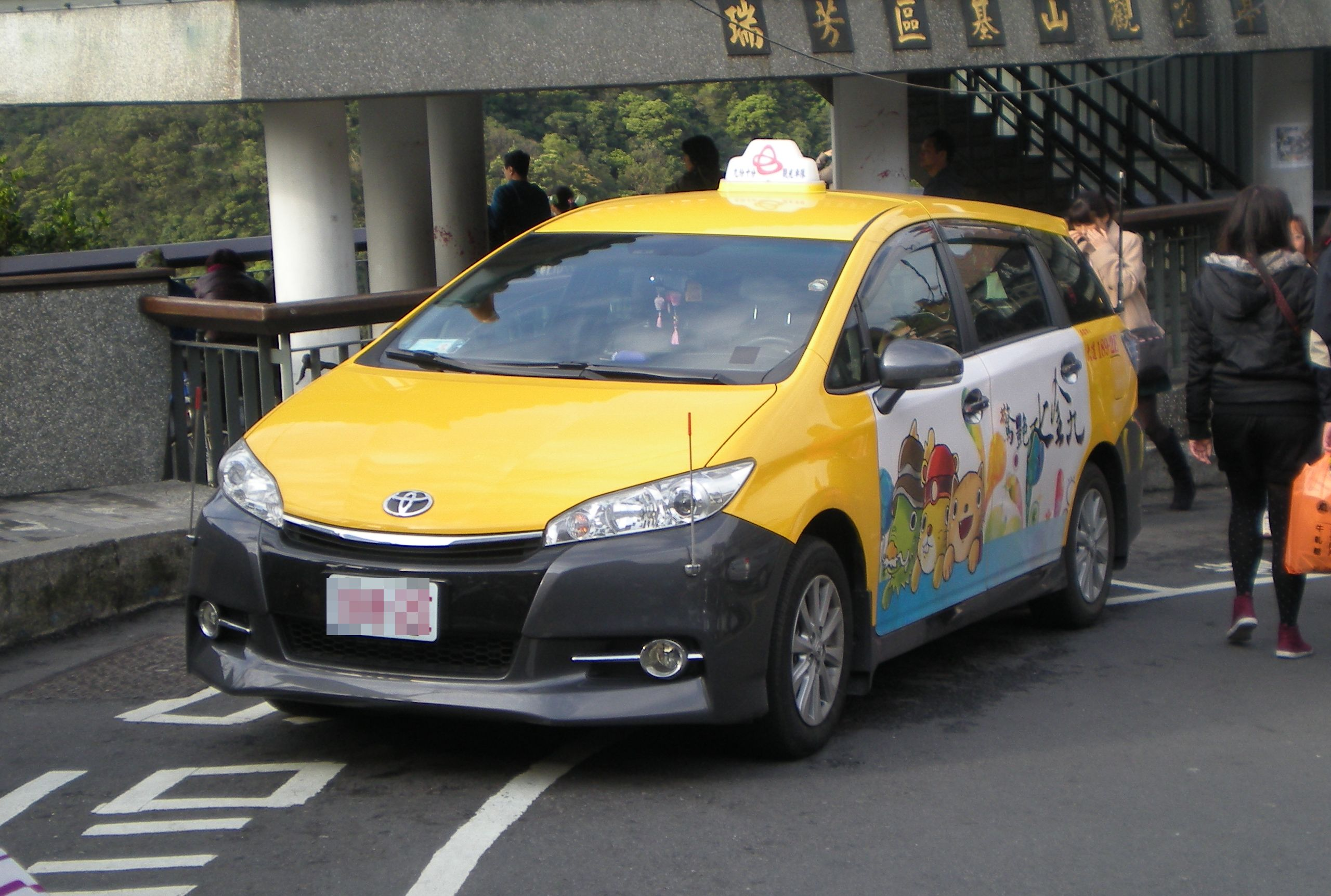 トヨタ・ウィッシュ タクシー 189-2E